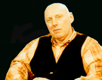 Portrait d'Jan Voss.